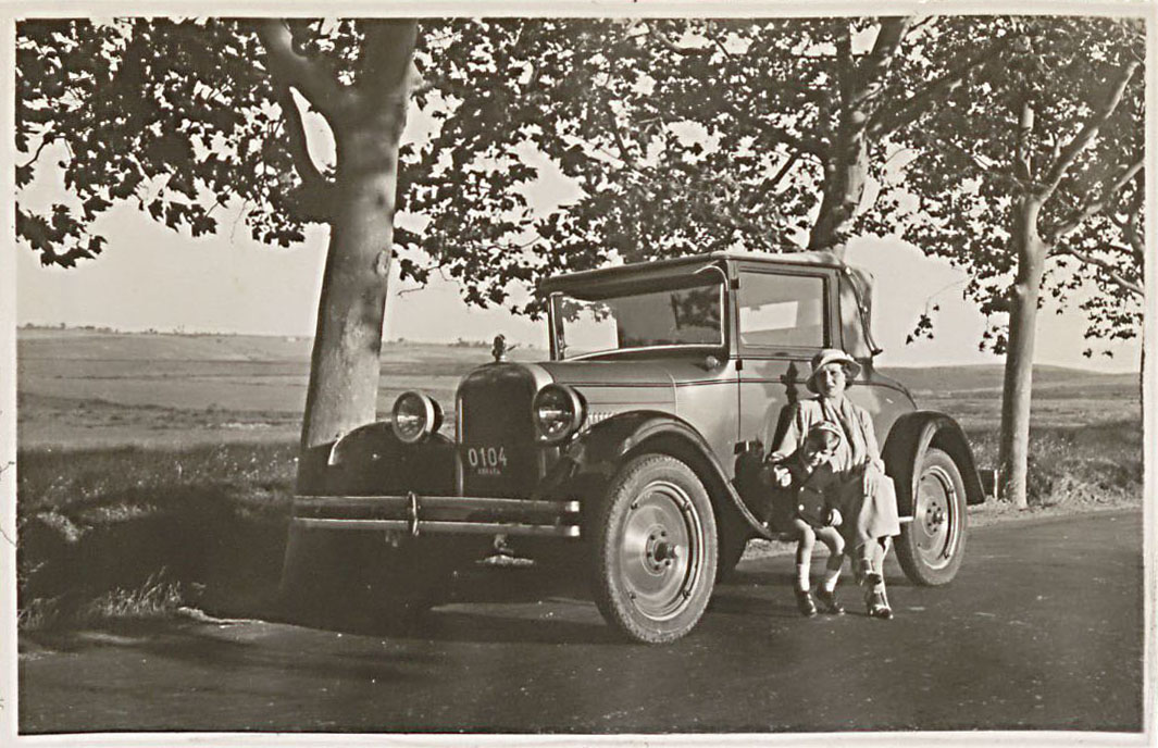 Maslak Road, İstanbul, VII. 1932 SALT Research, Said Bey Archive Maslak yolu, İstanbul, VII.1932 SALT Araştırma, Said Bey Arşivi